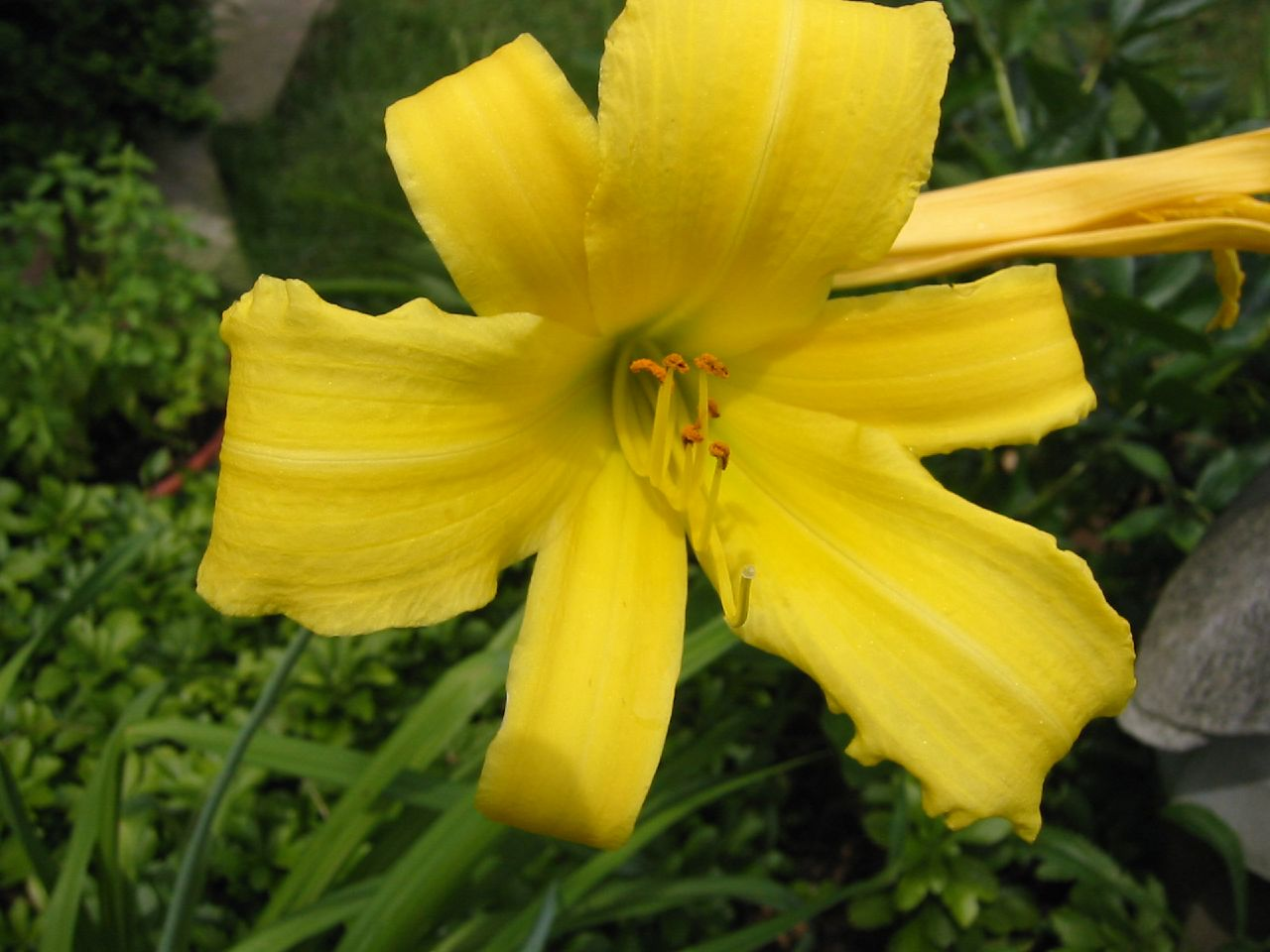 Stella d'Oro